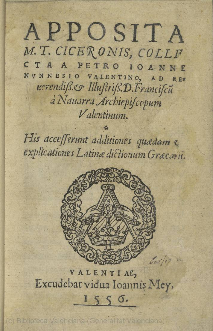 Portada de l'obra "Apposita M. T. Ciceronis collecta" (1556) de Pere Joan Nunyes. Valentiae : excudebat vidua Ioannis Mey, 1556.